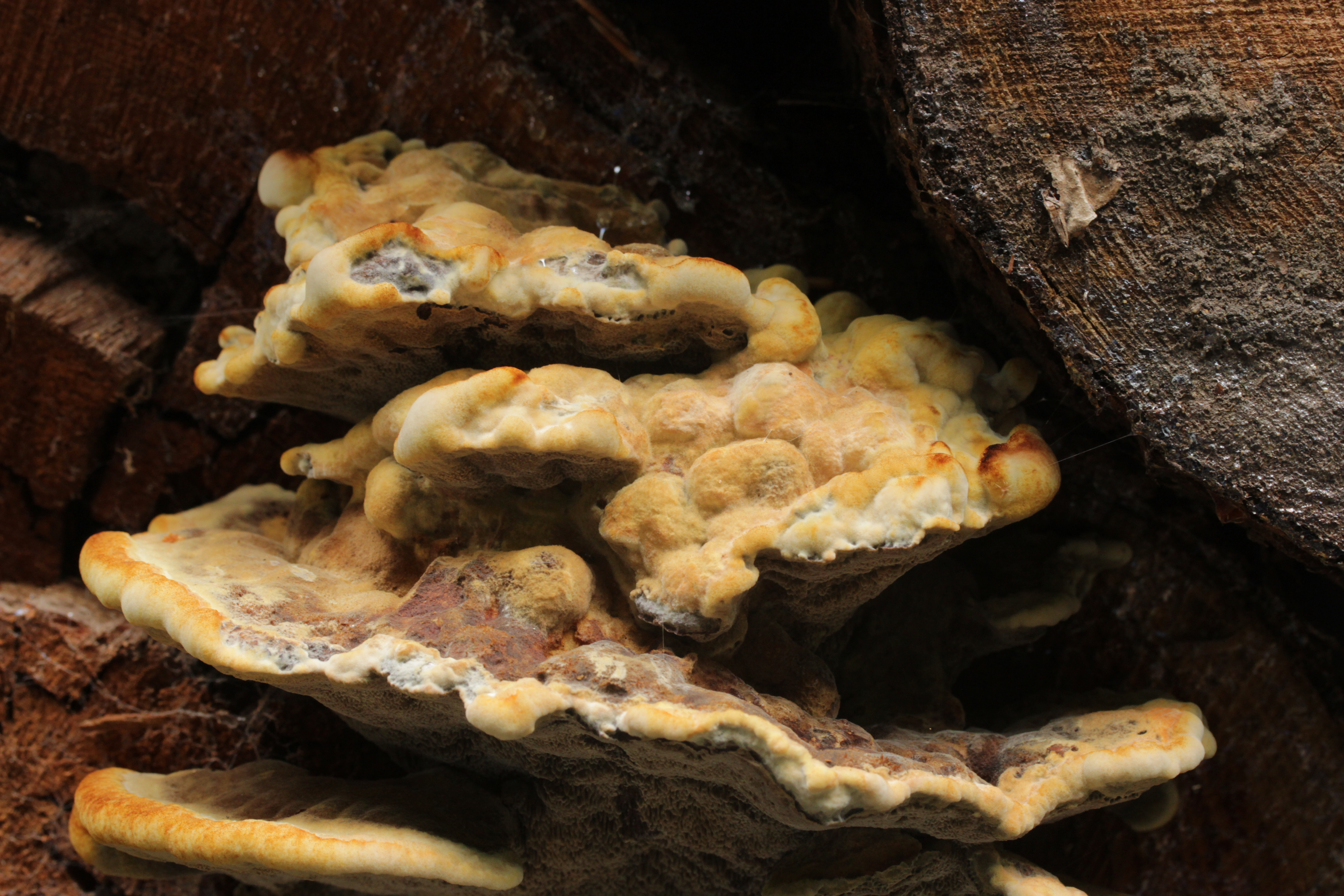 Velvet-top Fungus - Phaeolus spadiceus